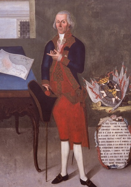 Francisco Luis Héctor, V Barón de Carondelet. Fue un funcionario español de origen francés, que ostentó los cargos coloniales de Intendente de San Salvador, Gobernador de Luisiana y Presidente de la Real Audiencia de Quito. Óleo sobre lienzo, autor desconocido (siglo XIX).